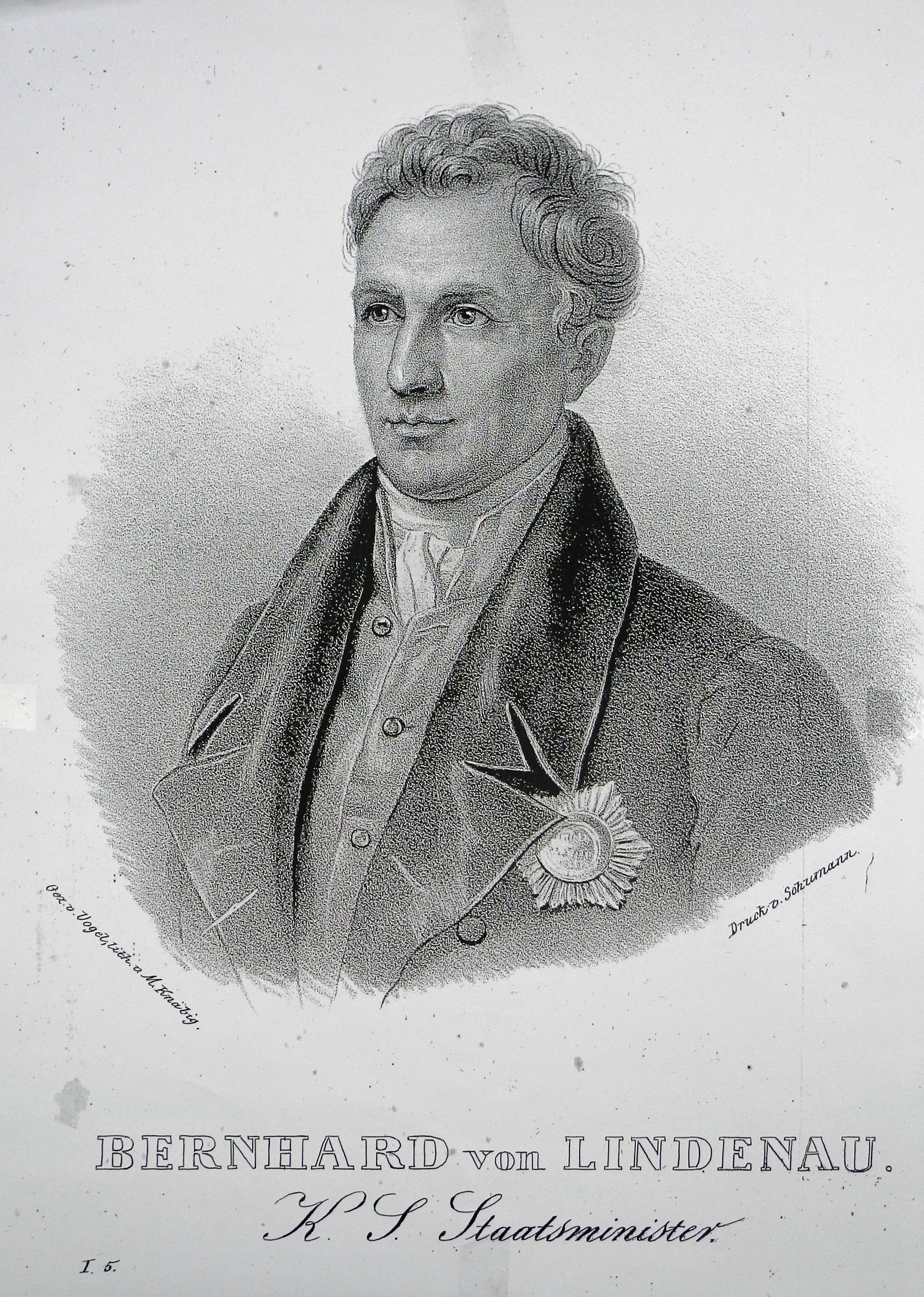 Tag des offenen Denkmals 2018 in Dresden: Porträt Bernhard von Lindenau – Namensgeber der denkmalgerecht sanierten 49. Grundschule „Bernhard August von Lindenau“ in Dresden.